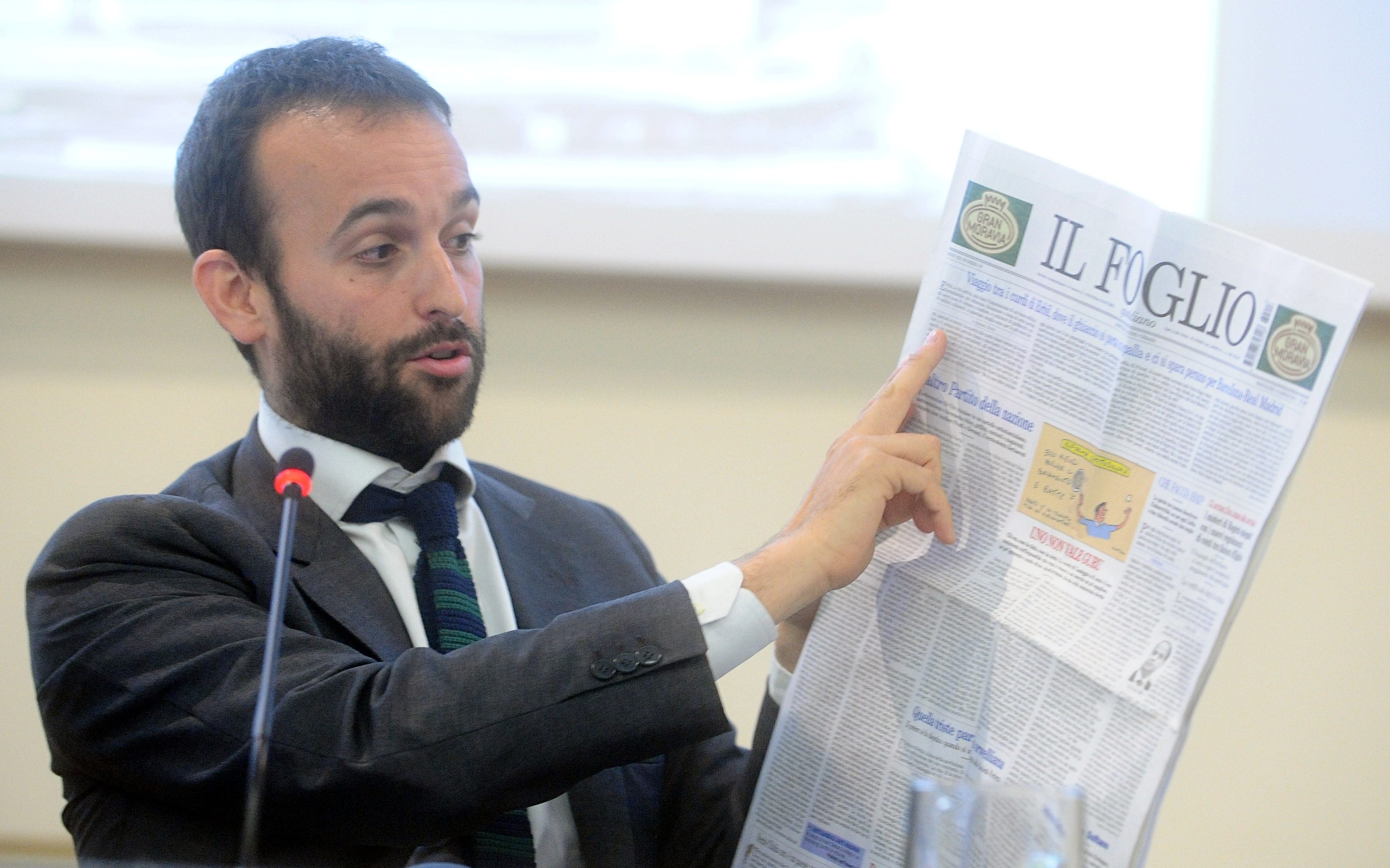 Claudio Cerasa con una copia de Il Foglio, il giornale che dirige, al ciclo di incontri "Giornalismo" organizzato dall'Università di Trento.